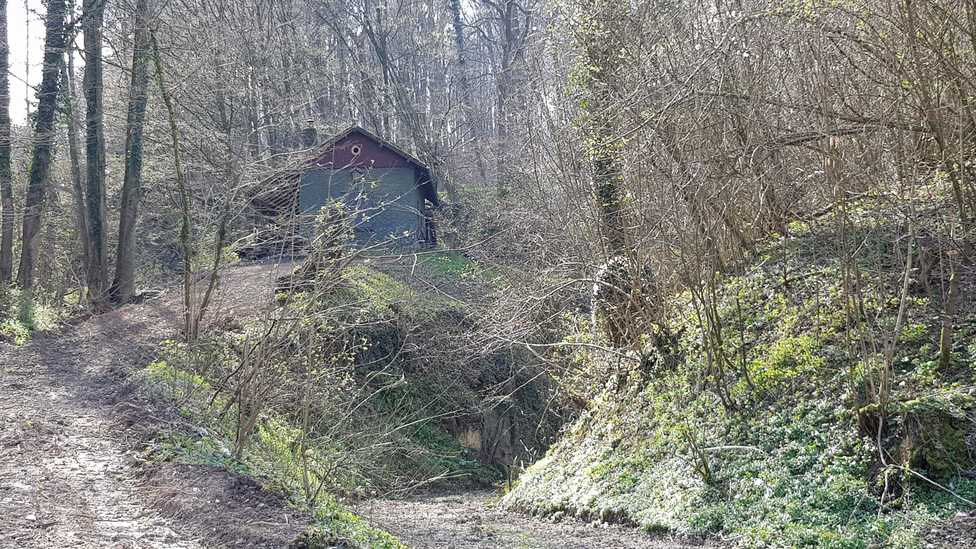 Meerssenergroeve, Meerssen, Nederland